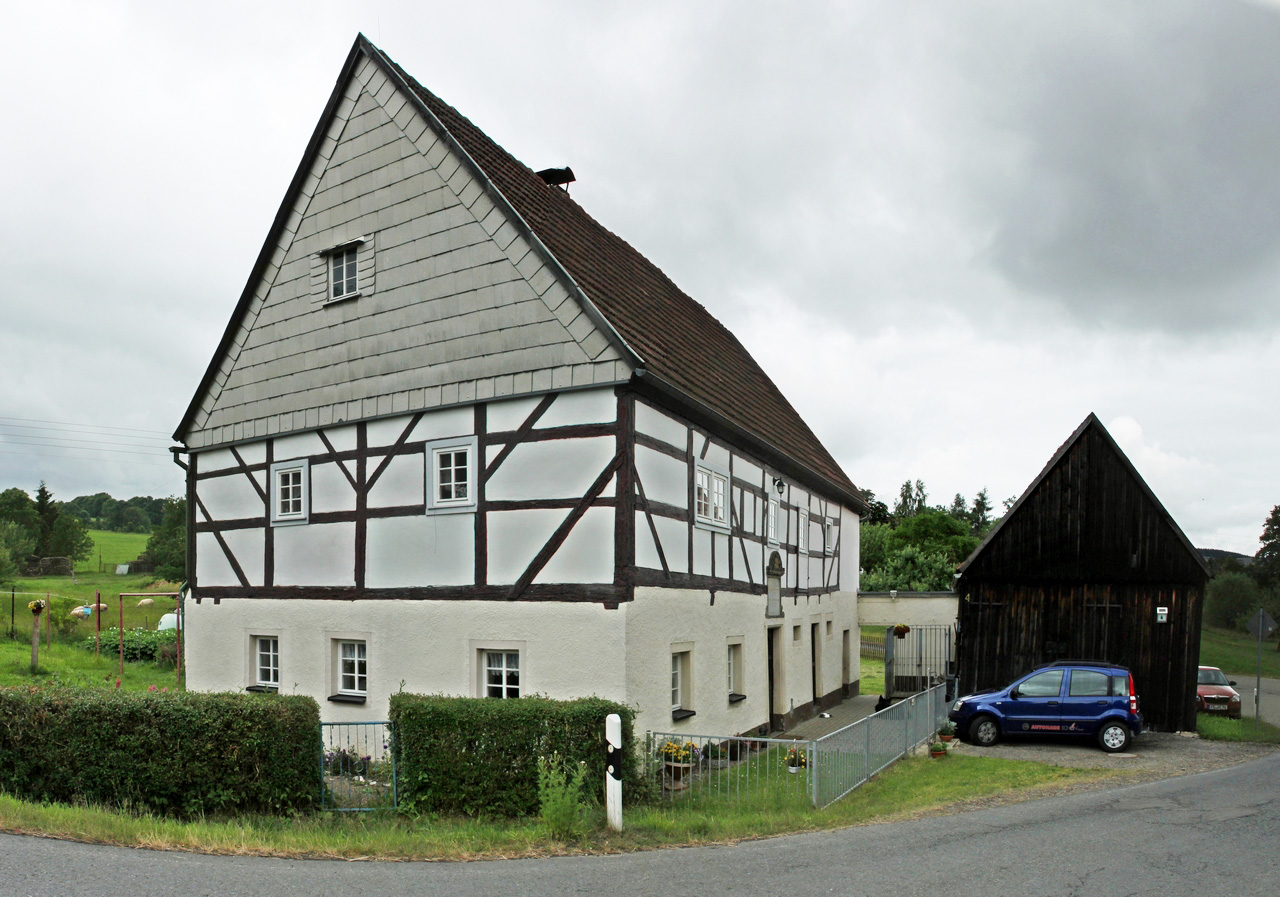 Blick auf das Wohnhaus der Familie Silbermann in Kleinbobritzsch. Das Haus wurde 1680 von Michael Silbermann (1640-1713) erbaut. Seine Söhne waren die berühmten Orgelbaumeister Andreas Silbermann (1678-1734) und Gottfried Silbermann (1680-1753), die bis zum Umzug der Familie nach Frauenstein 1685/86 hier ihre Kindheit verbrachten.